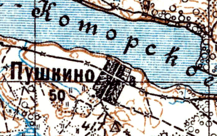 Топографическая карта Ленинградской области, квадрат VIc-26 (Ставотино), деревня Пушкино